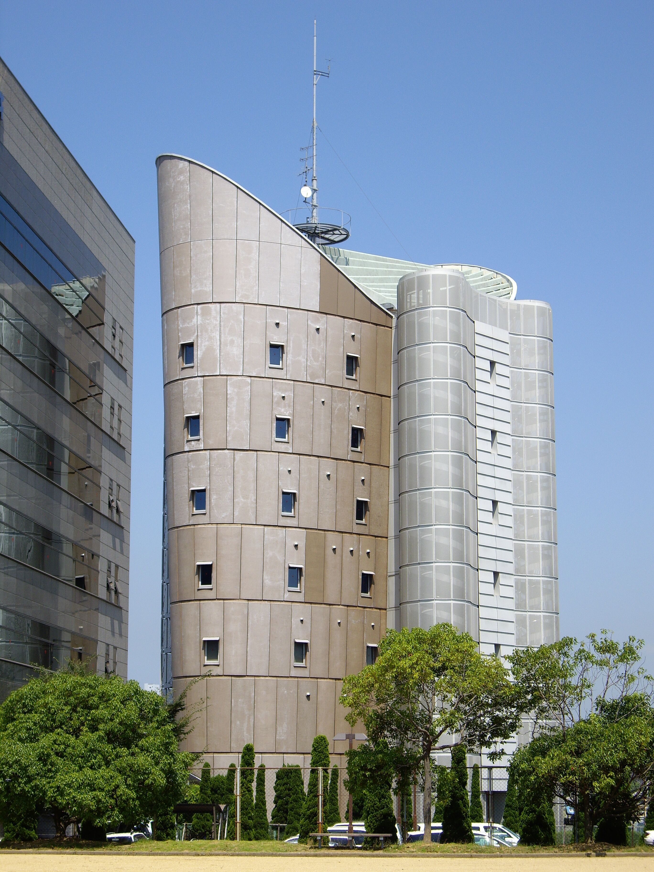 丸亀平井美術館の背面 - 日本国香川県丸亀市